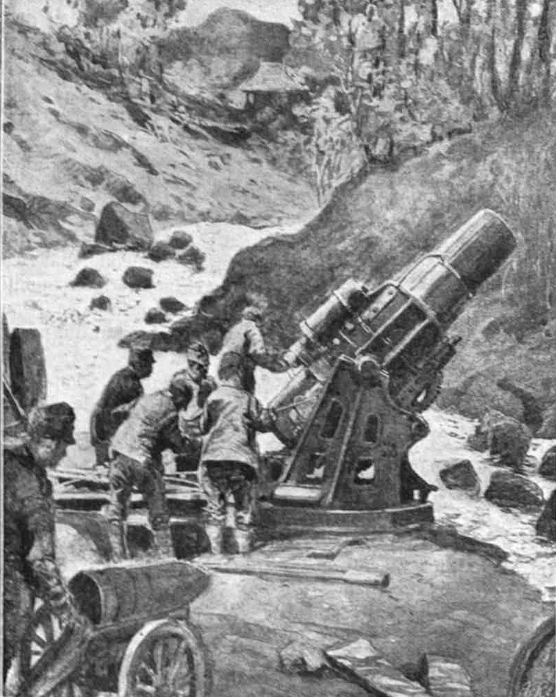 D - Mortier austriac de 305 mm in pozitie la Titesti pe Valea Oltuluii 1916 Kiritescu II 130